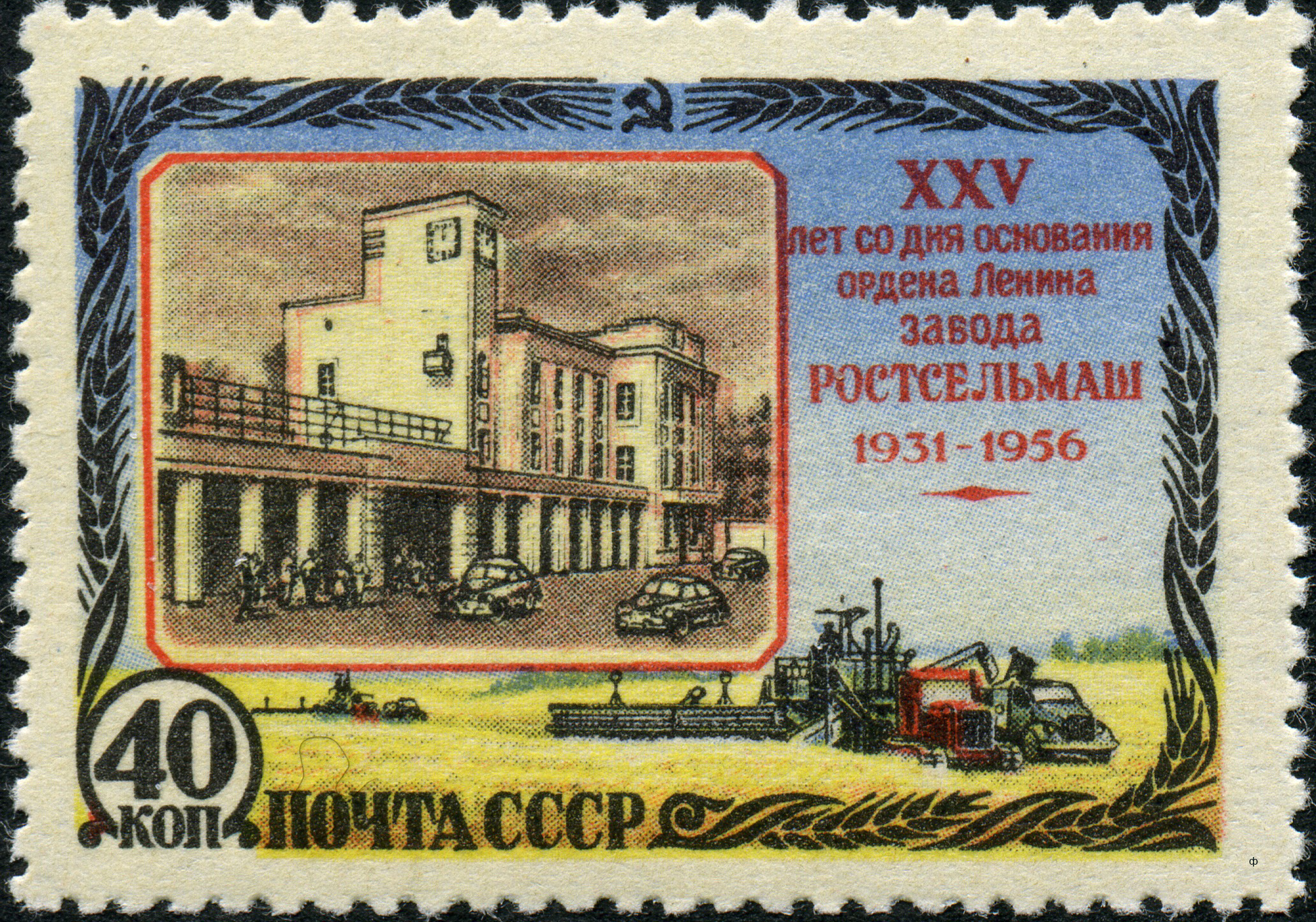 Марка СССР